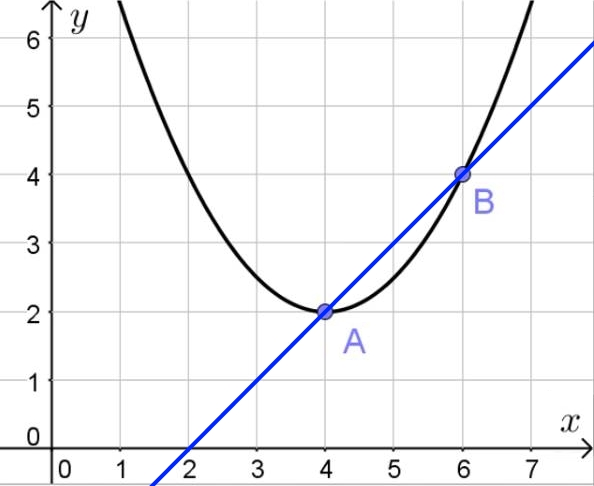 Пример точек пересечения с y=0,5x2-4x+10 и y=x-2